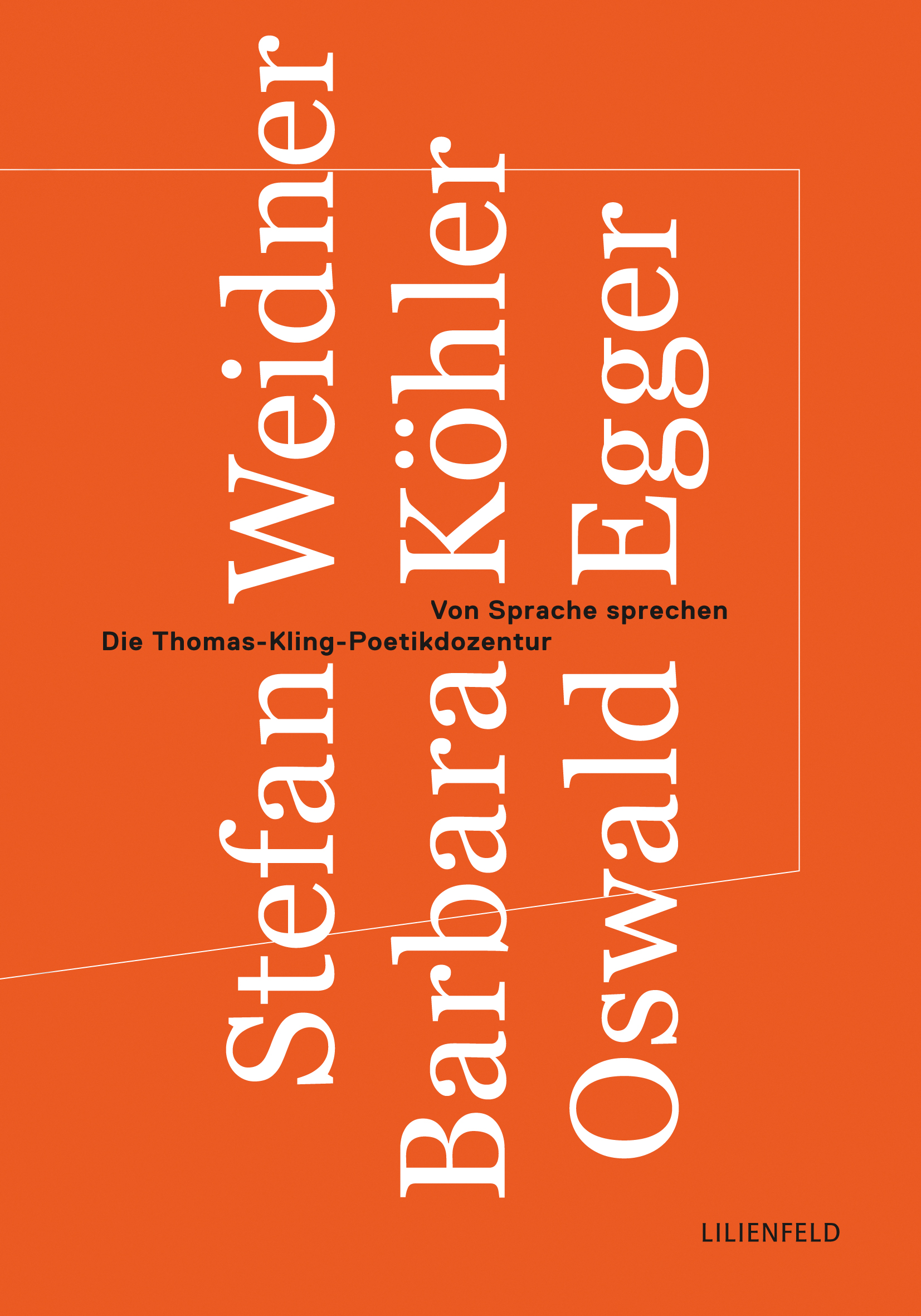 Cover: Von Sprache sprechen.